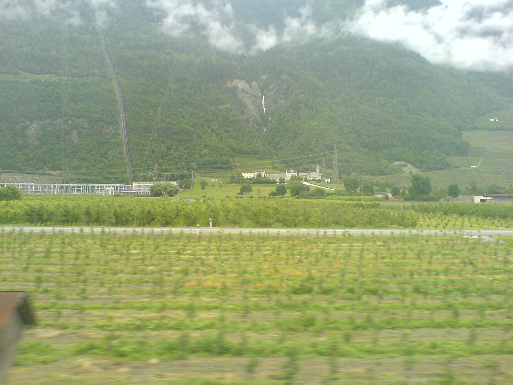 Écône in Valais, Switzerland